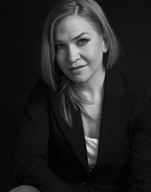 Bild från Plaza Magazine på dåvarande moderedaktör Sofia Hallström